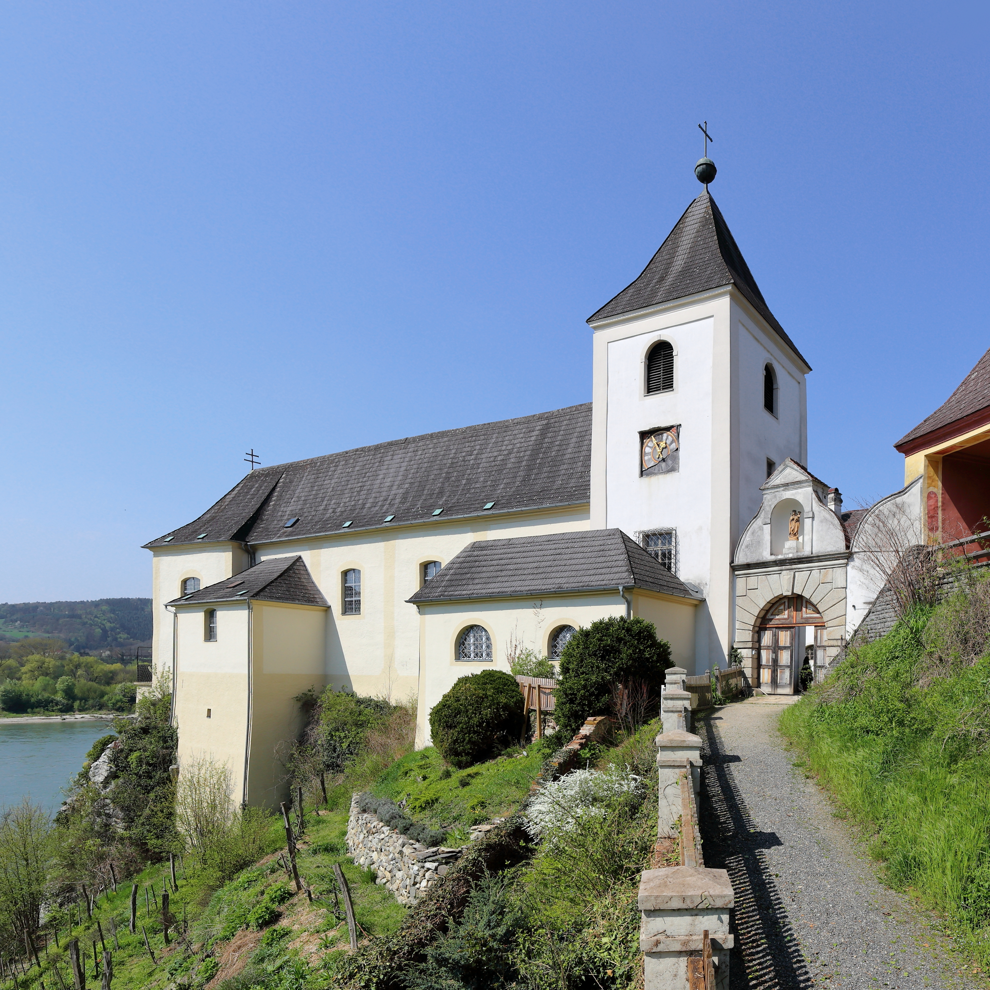 Südostansicht der ehemaligen Serviten-Klosterkirche und Pfarrkirche von Schönbühel, ein Ortsteil der niederösterreichischen Marktgemeinde Schönbühel-Aggsbach.Die lang gestreckte, schmale und einschiffige Kirche wurde im Zuge der Klostererrichtung in der 2. Hälfte des 17. Jahrhunderts gebaut. Ursprünglich war das Pfarrrecht bei der Kapelle des Schlosses Schönbühel, 1786 wurde es auf die Klosterkirche übertragen und 1980 erfolgte die Auflösung des Klosters.